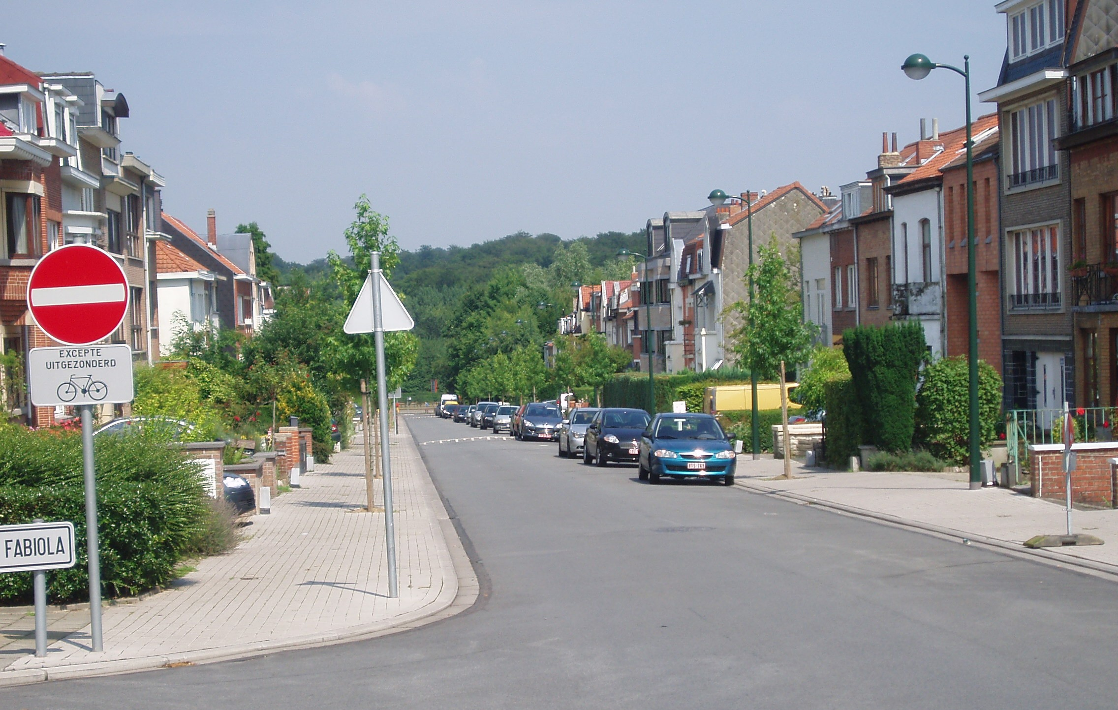 avenue Hugo van der Goes Auderghem Belgium